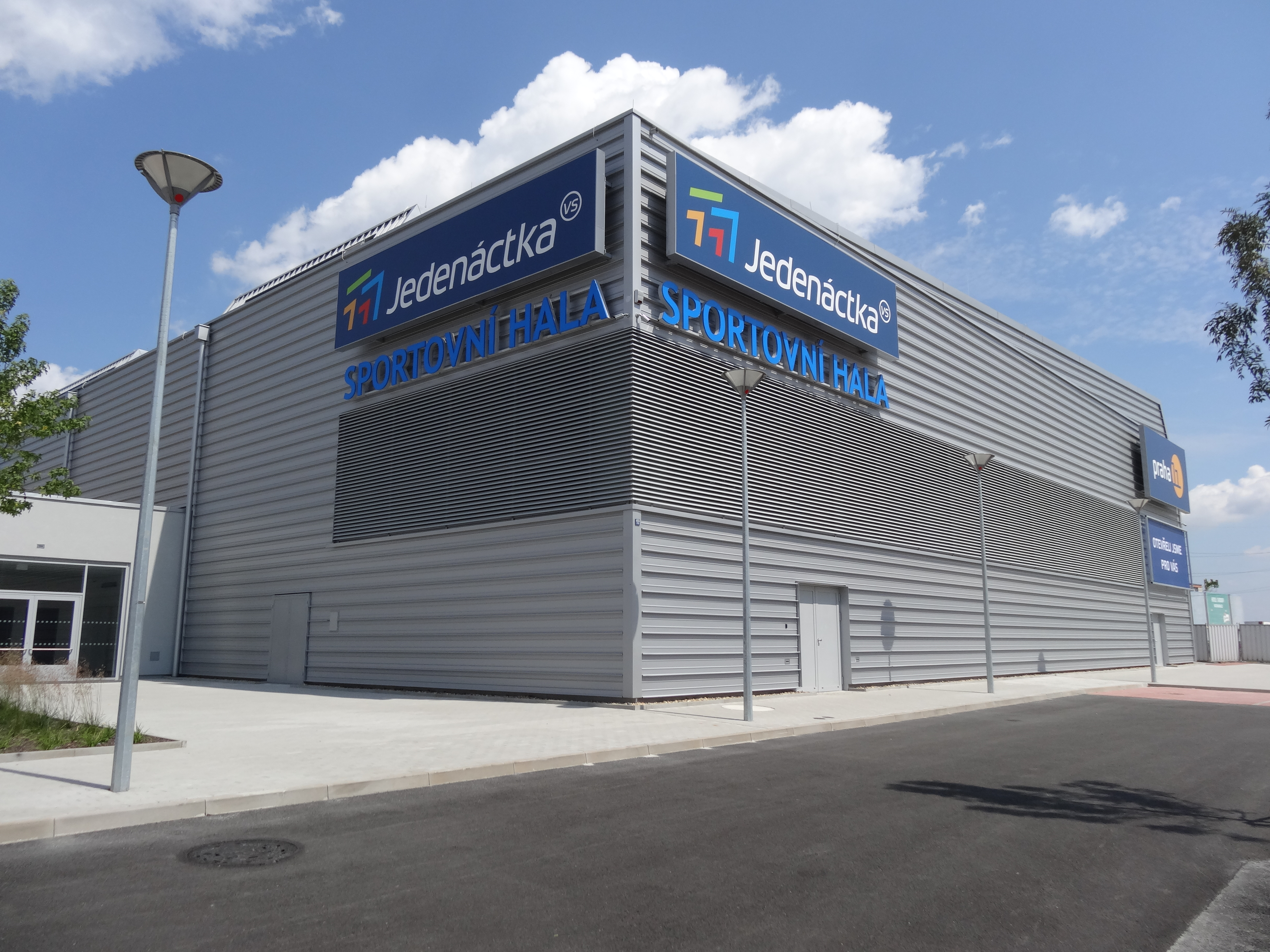 Autor Jiří Borový – IZDoprava.cz